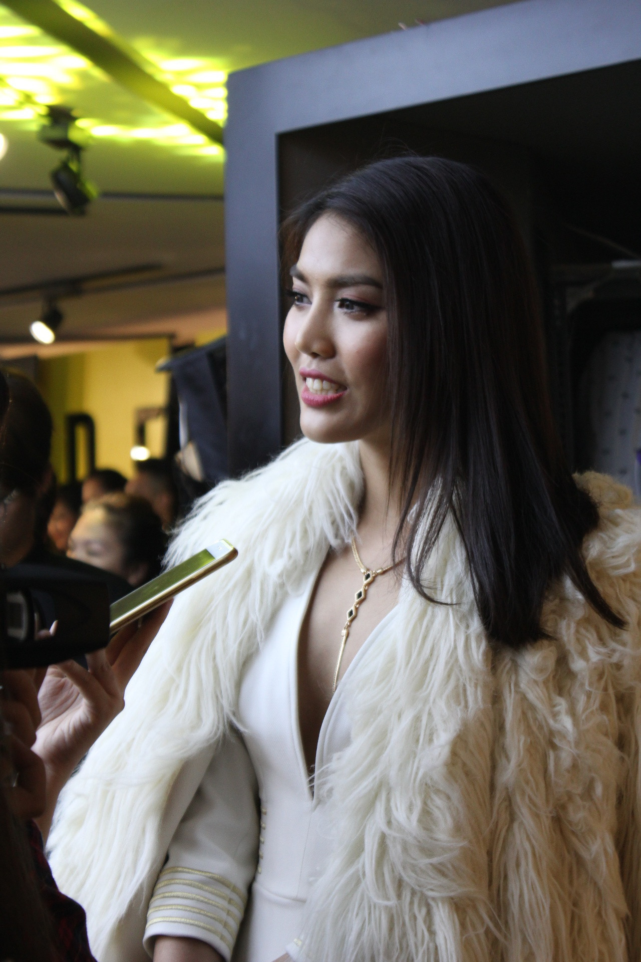 Lan Khuê tham dự sự kiện ở Tràng Tiền Plaza, Hà Nội